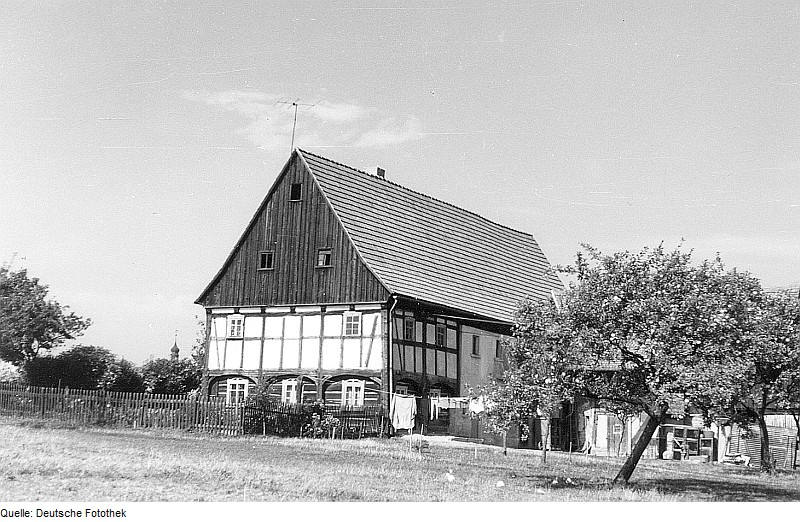 Original image description from the Deutsche Fotothek Mittelherwigsdorf-Oberseifersdorf. Ehem. Rothemühle, Müllerwohnhaus